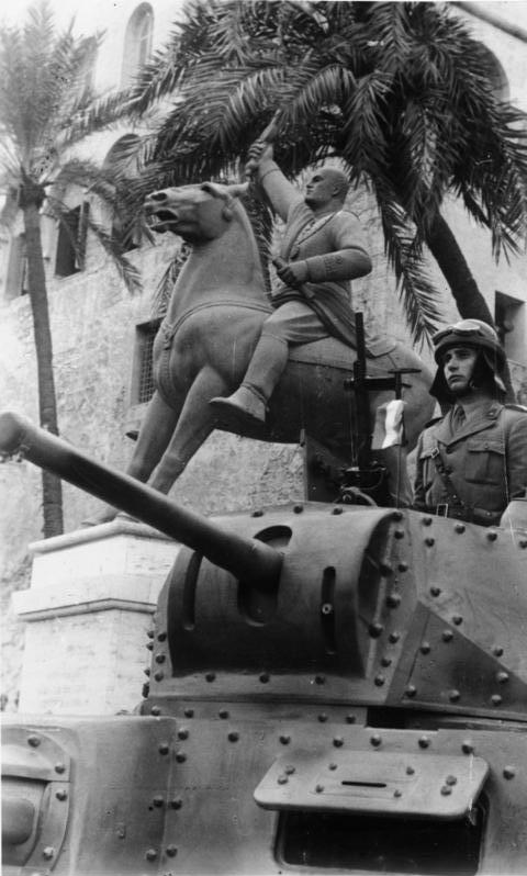 Nordafrika, Truppenparade in Tripolis Truppenparade vor General Rommel in Tripolis. Im Hintergrund das Reiterstandbild des Duce. Wie aus Stein gemeisselt zur Linken ein italienischer Panzerwagen. PK-Aufnahme: Kriegsberichter: Böcker (Sch) 3150-41 "Fr." "Fr.OKW" März 1941 [Tripolis.- Italienischer Panzersoldat in italienischem Panzer M13/40 vor Reiterstandbild von Benito Mussolini]